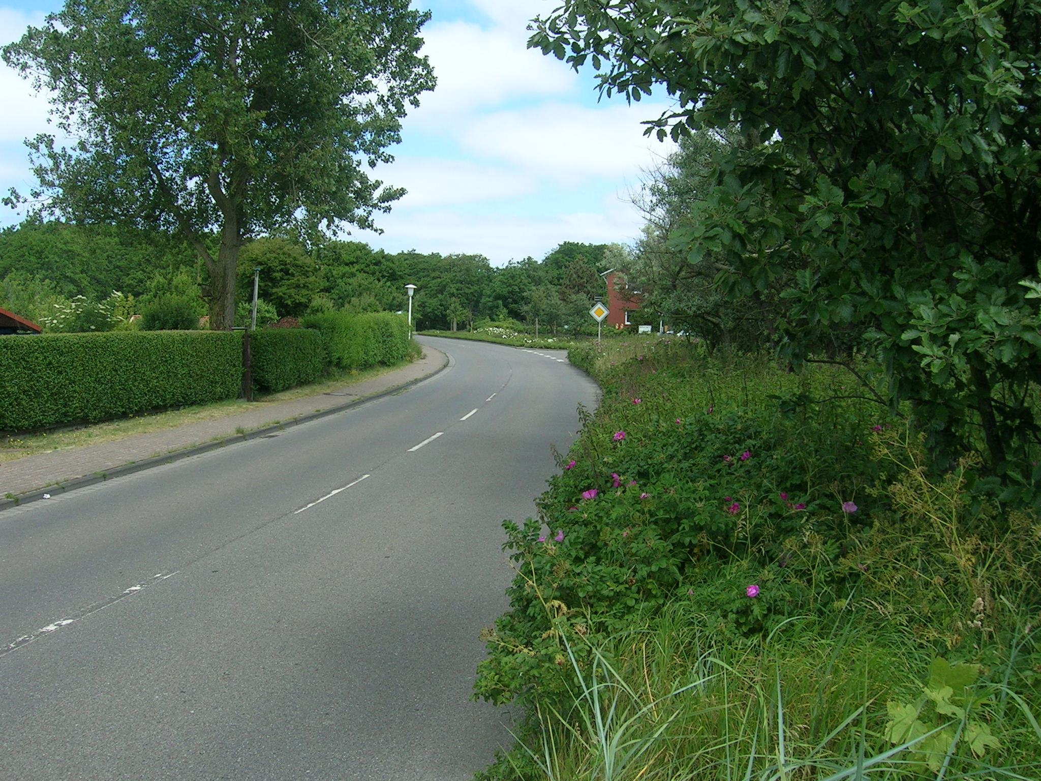 Deichstraße auf Norderney mit Blick in Richtung Osten